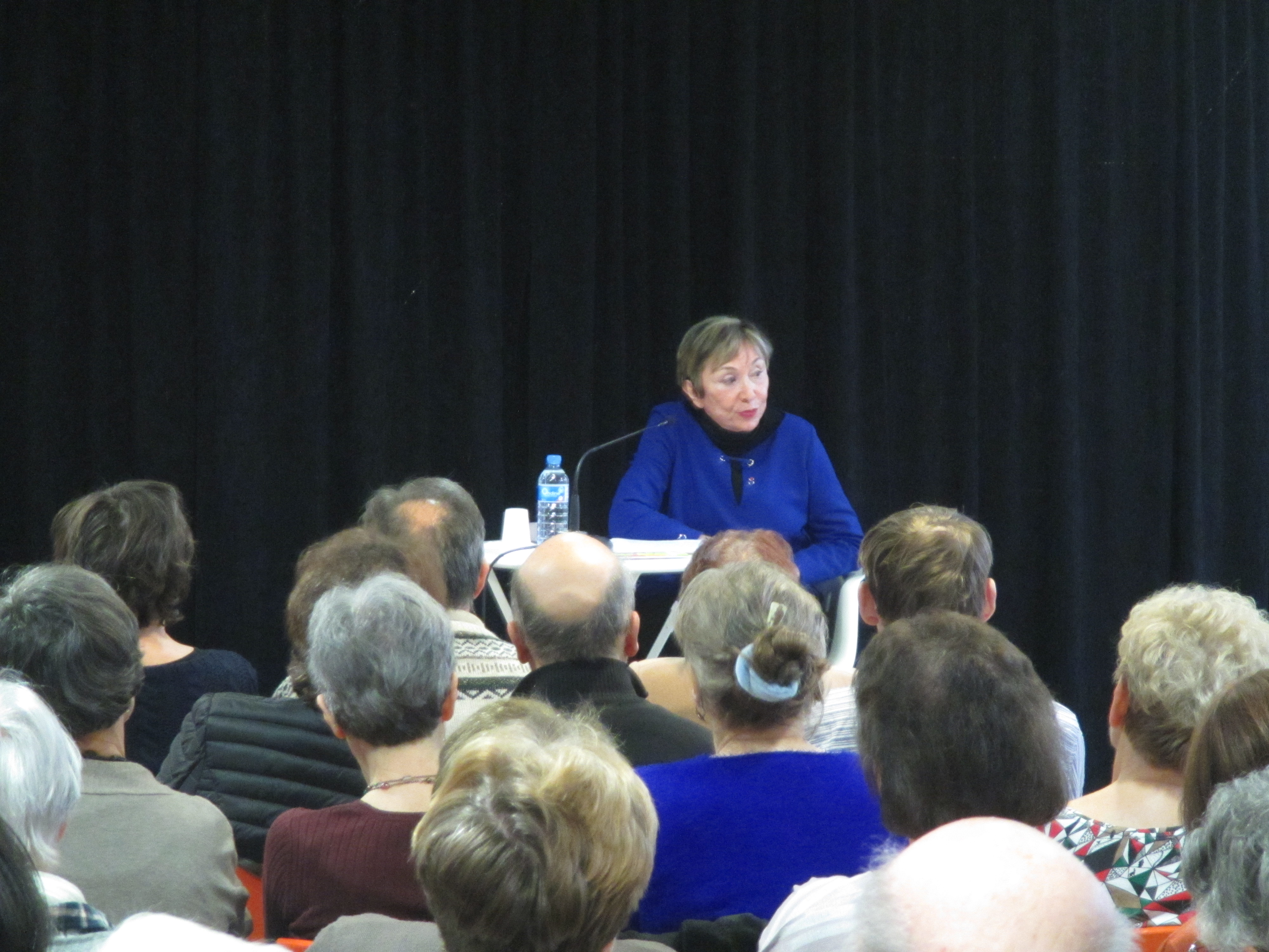 Julia Kristeva a rencontré les clamartois le 11 mars à la médiathèque La Buanderie dans le cadre des troisièmes rencontres philosophiques du Réseau des médiathèques de Clamart